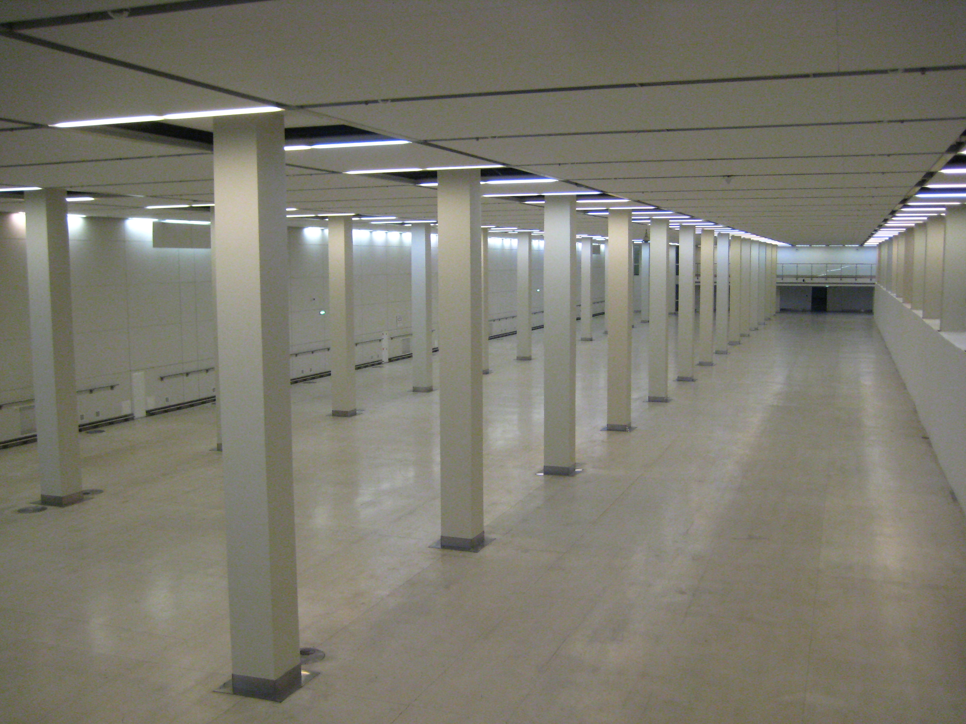 Московский Манеж. Интерьер